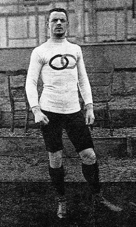 Frantz Reichel en février 1893 - mini-tournée de 'l'Union' (U.S.F.S.A.) en Angleterre.